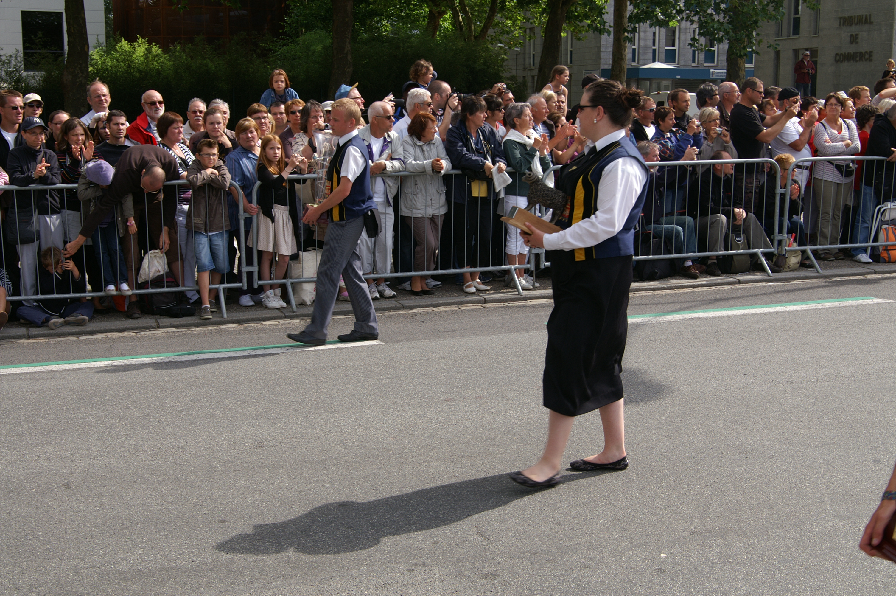 Le bagad Kemper, Festival interceltique de Lorient 2011. Présentation des trophées de champion du championnat des bagadoù 2011.